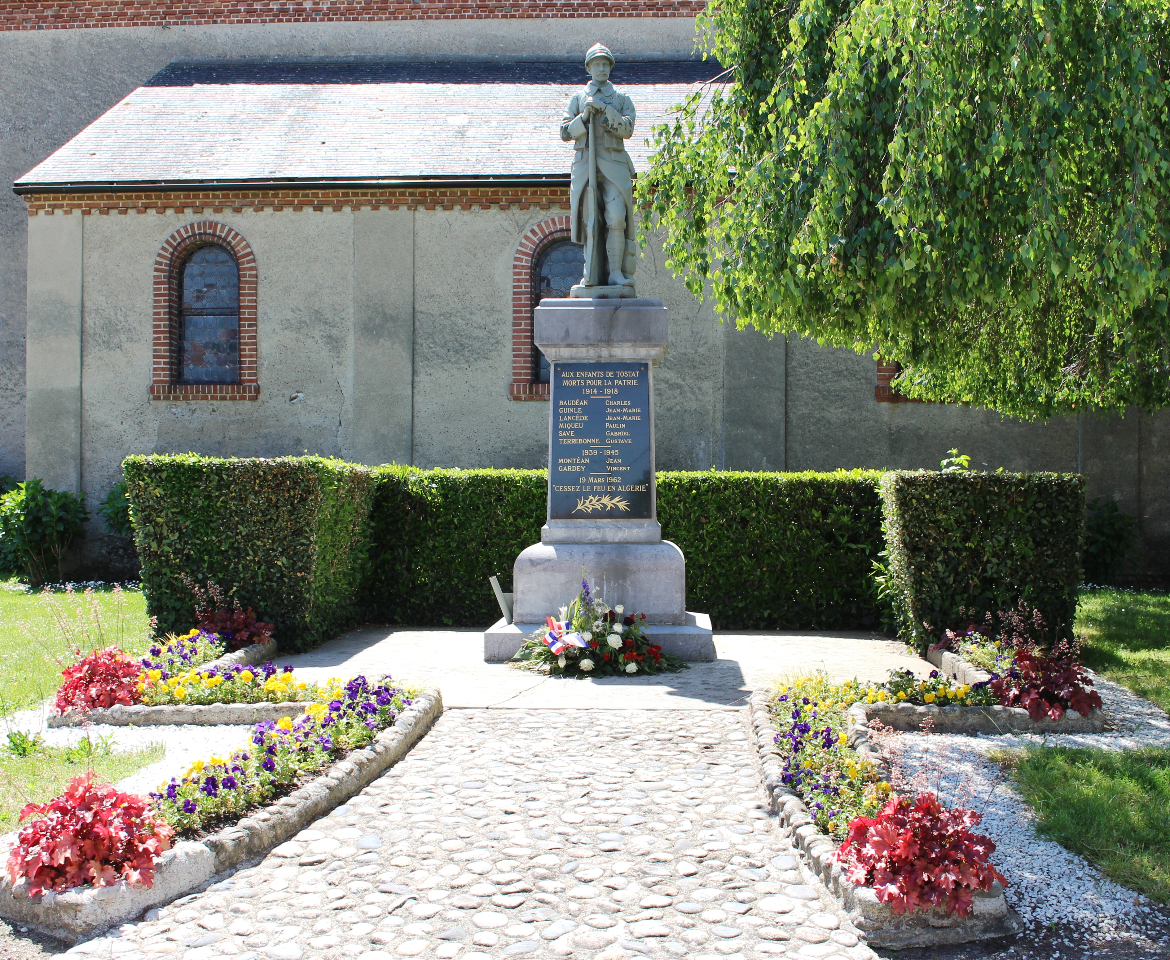 Monument aux morts de Tostat (Hautes-Pyrénées)